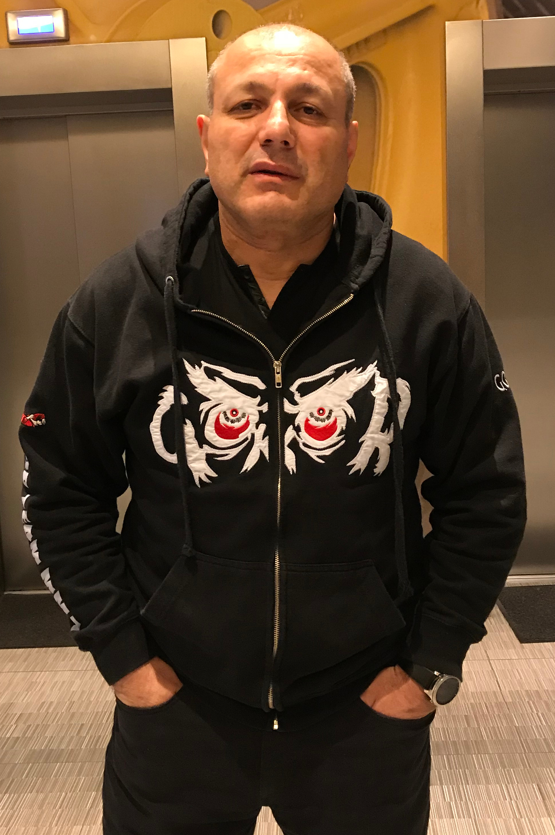 Gokor Chivichian en 2018 à Erevan.